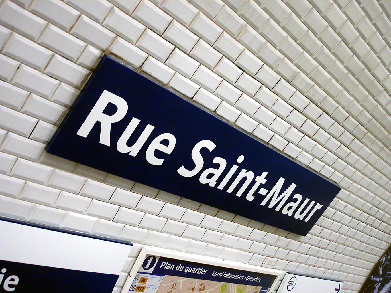 Station Rue Saint-Maur de la ligne 3 du métro de Paris, France.